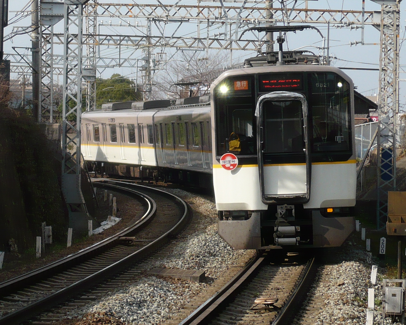 近鉄南大阪線 藤井寺～土師ノ里間